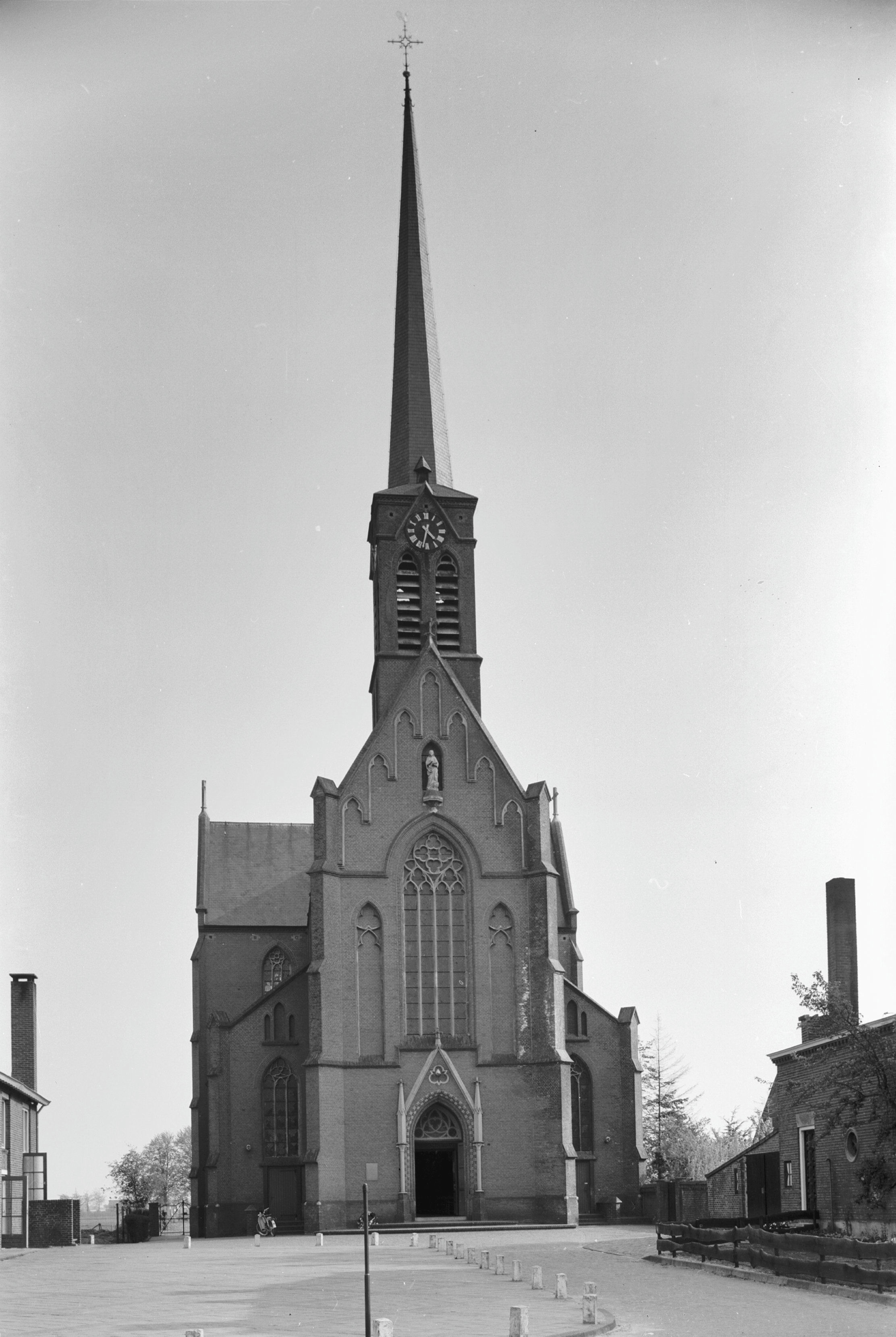 Rooms-Katholieke Kerk: toren